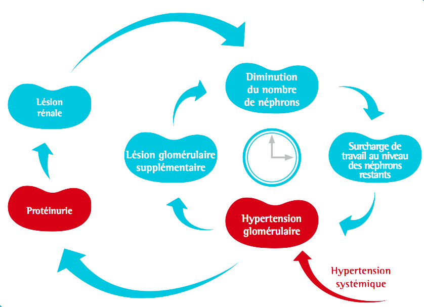 Pathophysiologie et progression de la Maladie Rénale Chronique